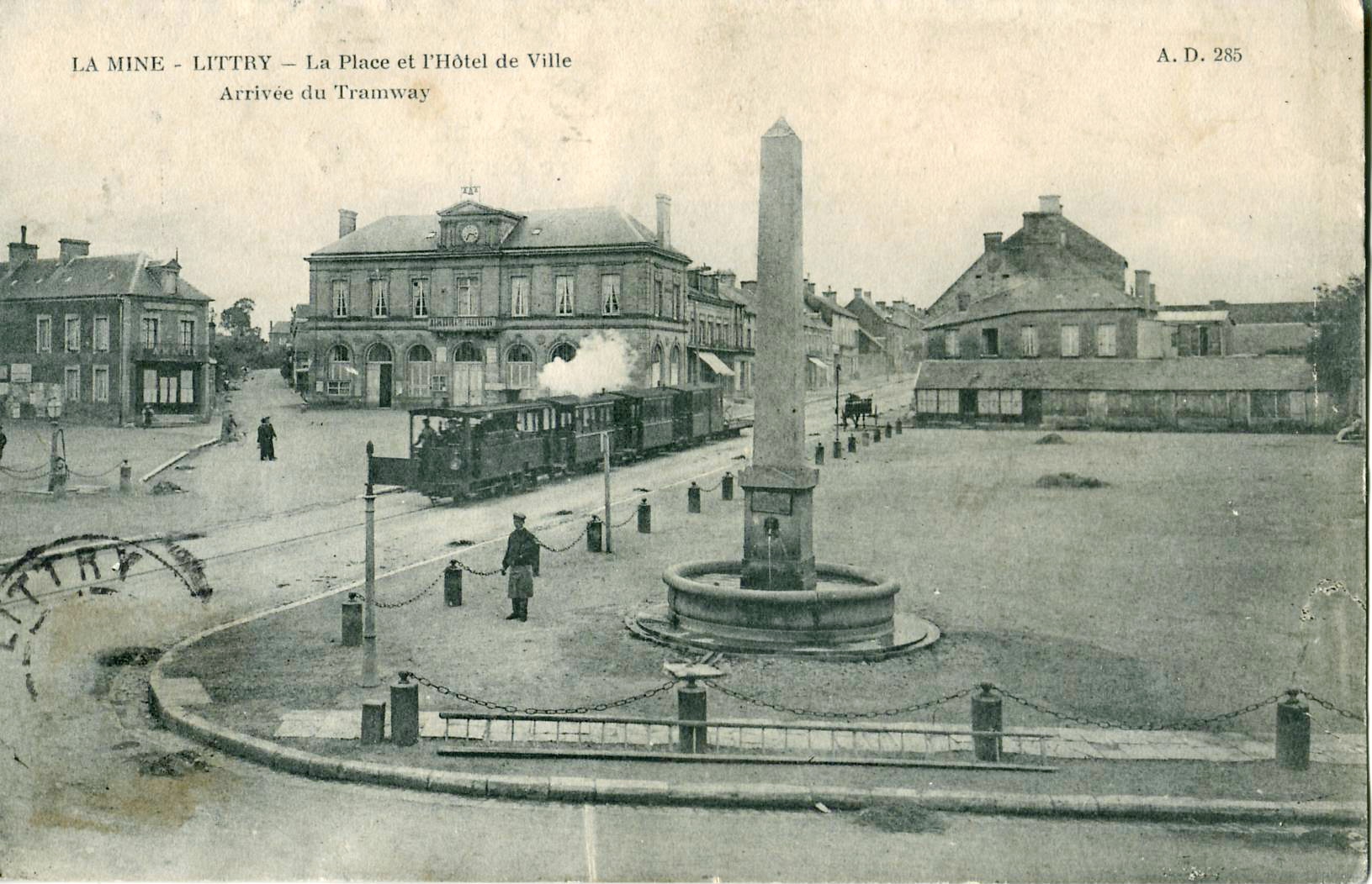 Carte postale ancienne éditée par A. D., n°285 :LA MINE - LITTRY - La Place et l'Hôtel de Ville - Arrivée du Tramway